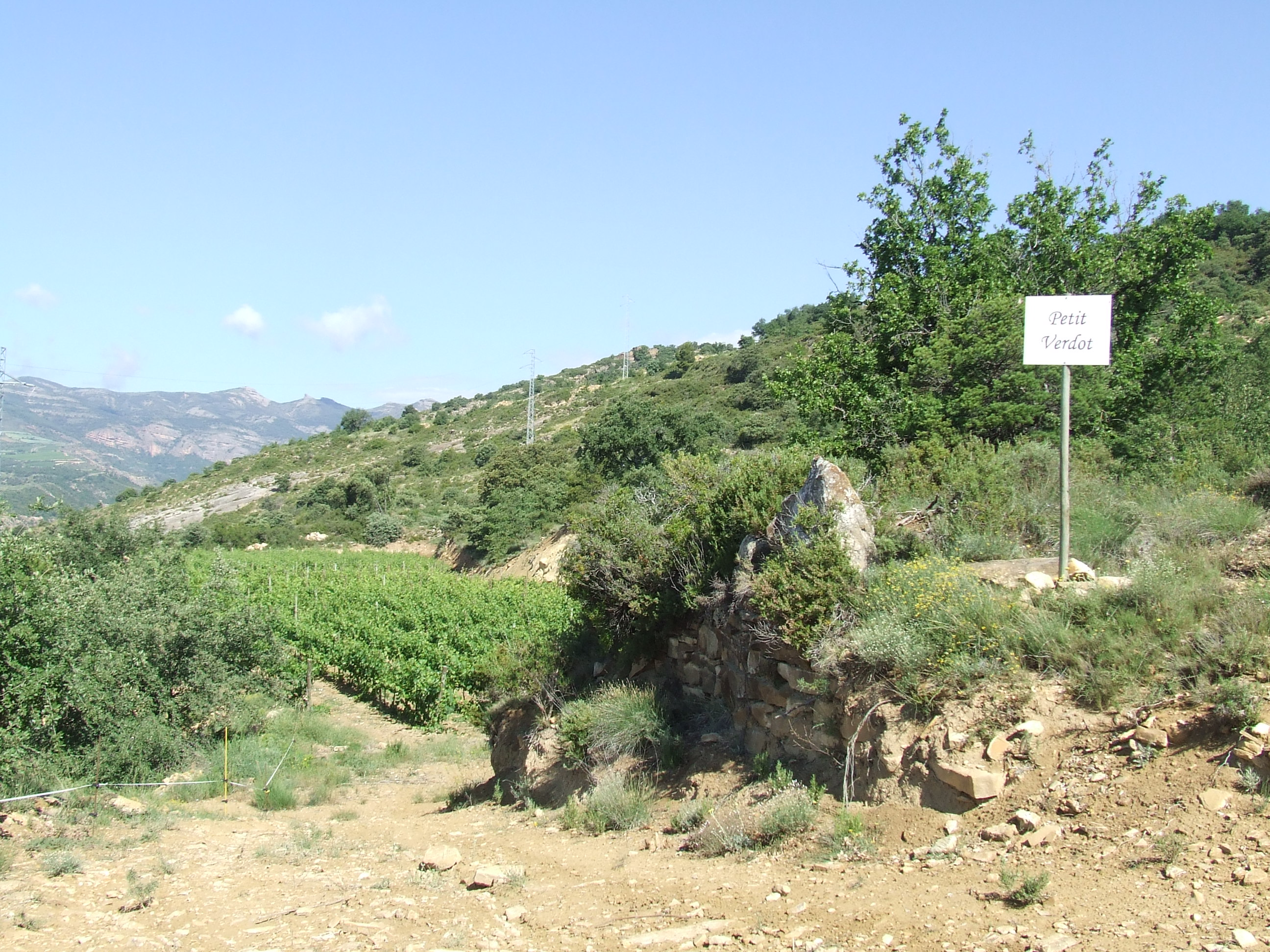 Les vinyes d'Encús (Castelló d'Encús, Talarn, Pallars Jussà)